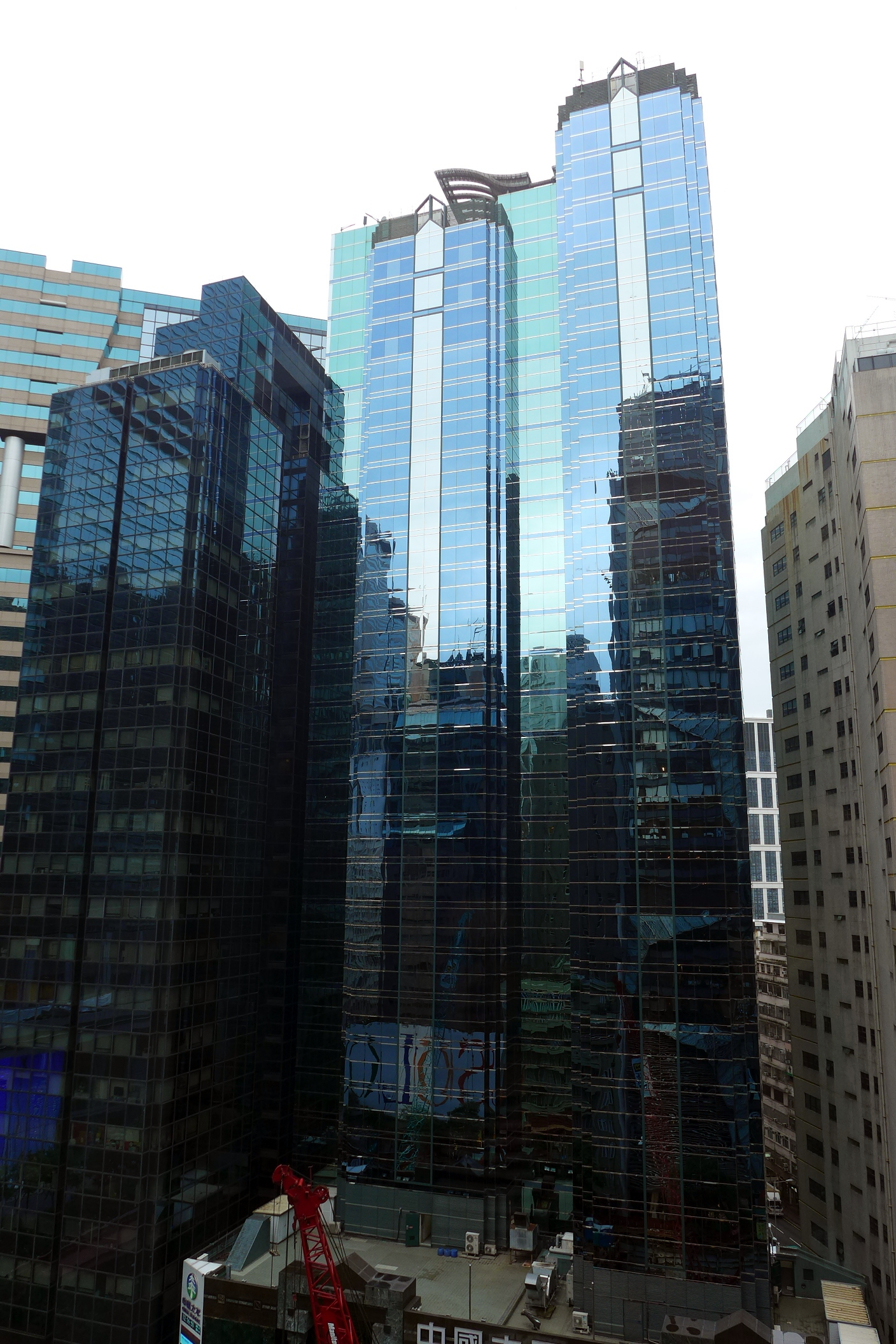 China Taiping Tower